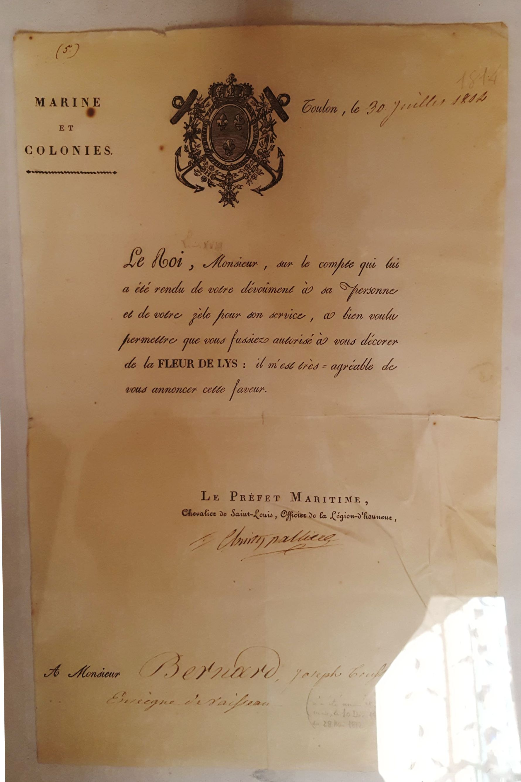 Original du décret du préfet maritime de Toulon